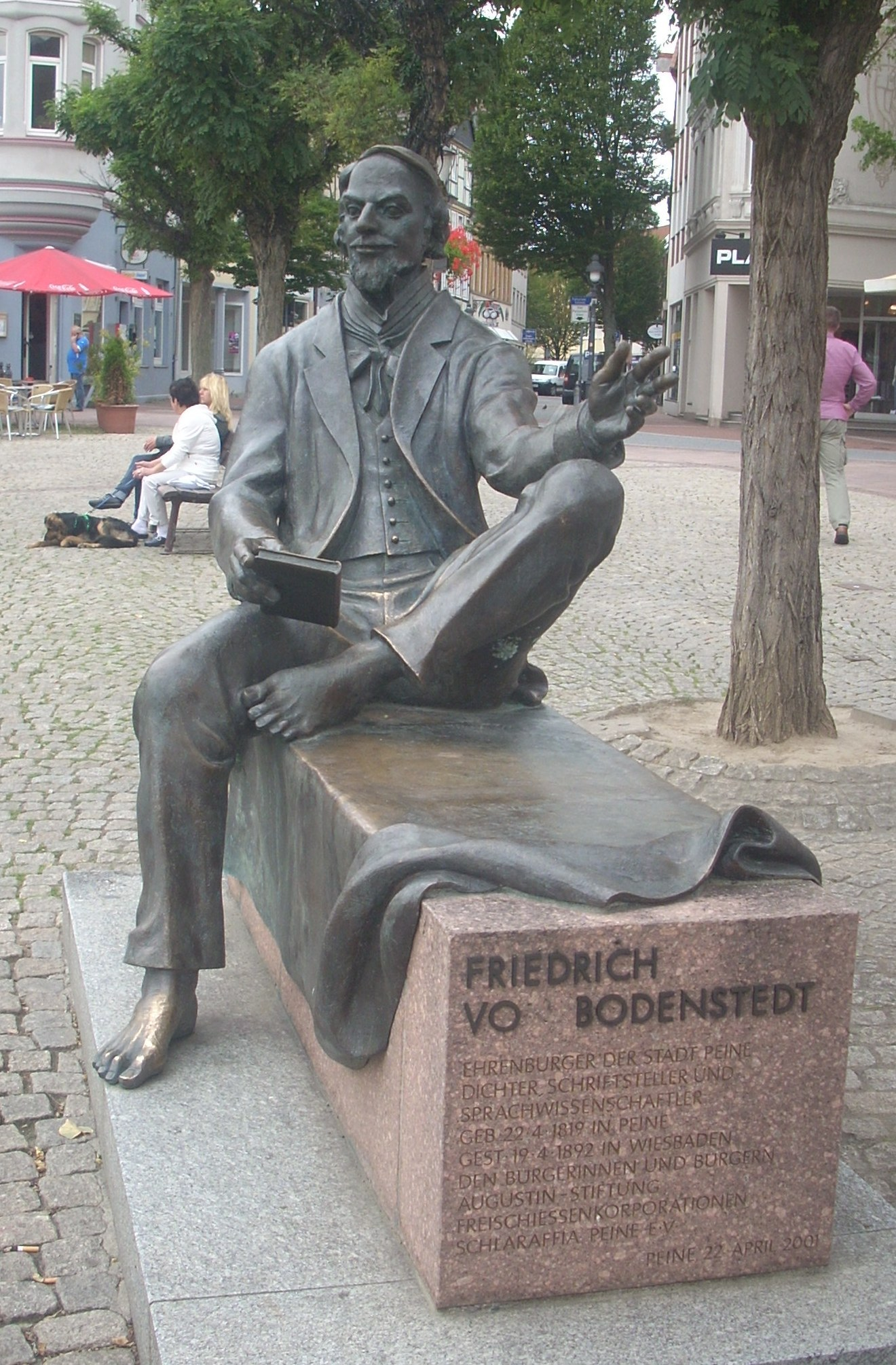 Peine, Marktplatz, Friedrich-von-Bodenstedt-Denkmal von 2001